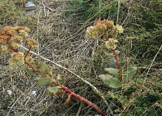 Sedum telephium